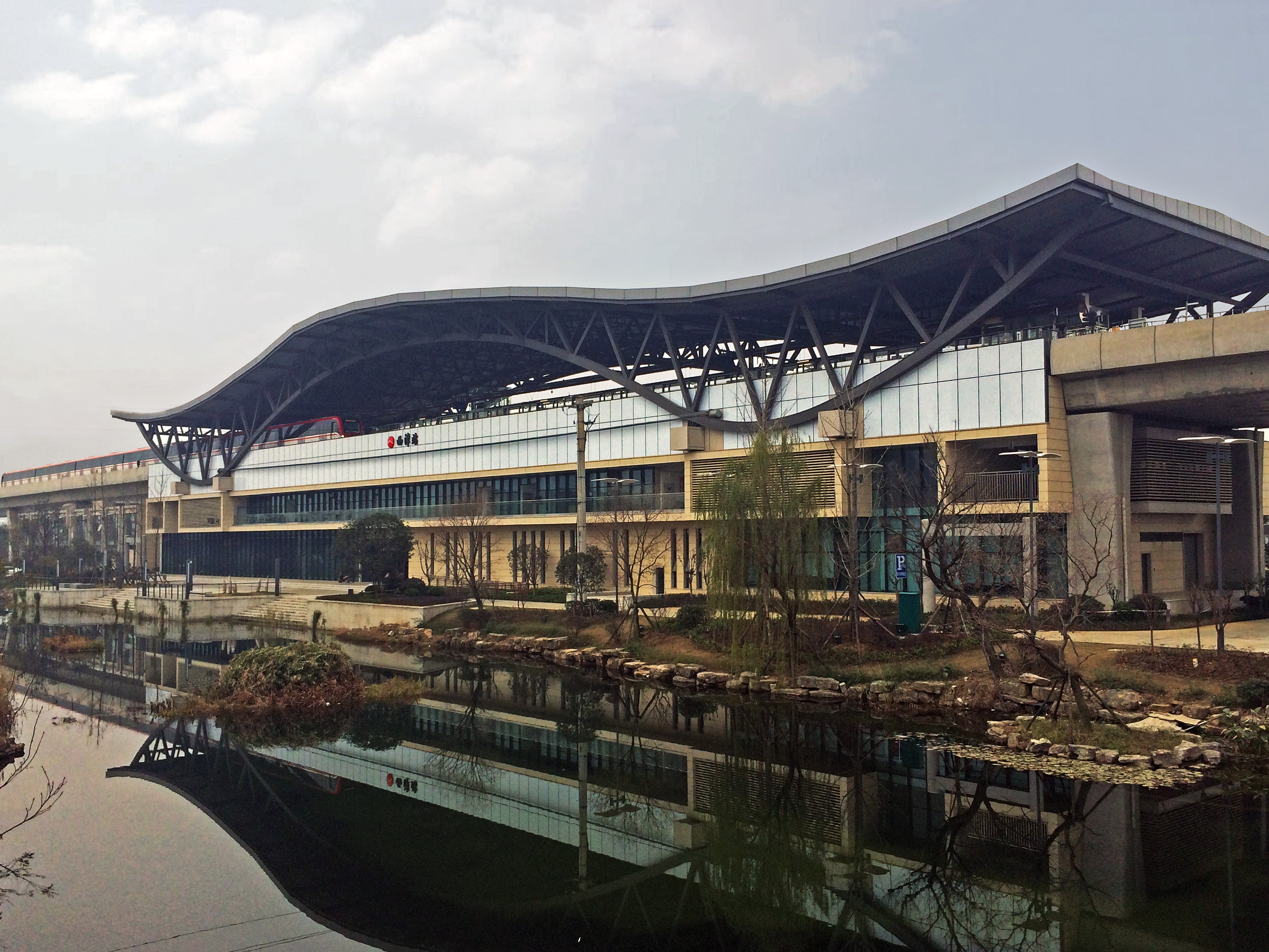 無錫地鐵1號線西漳站外景